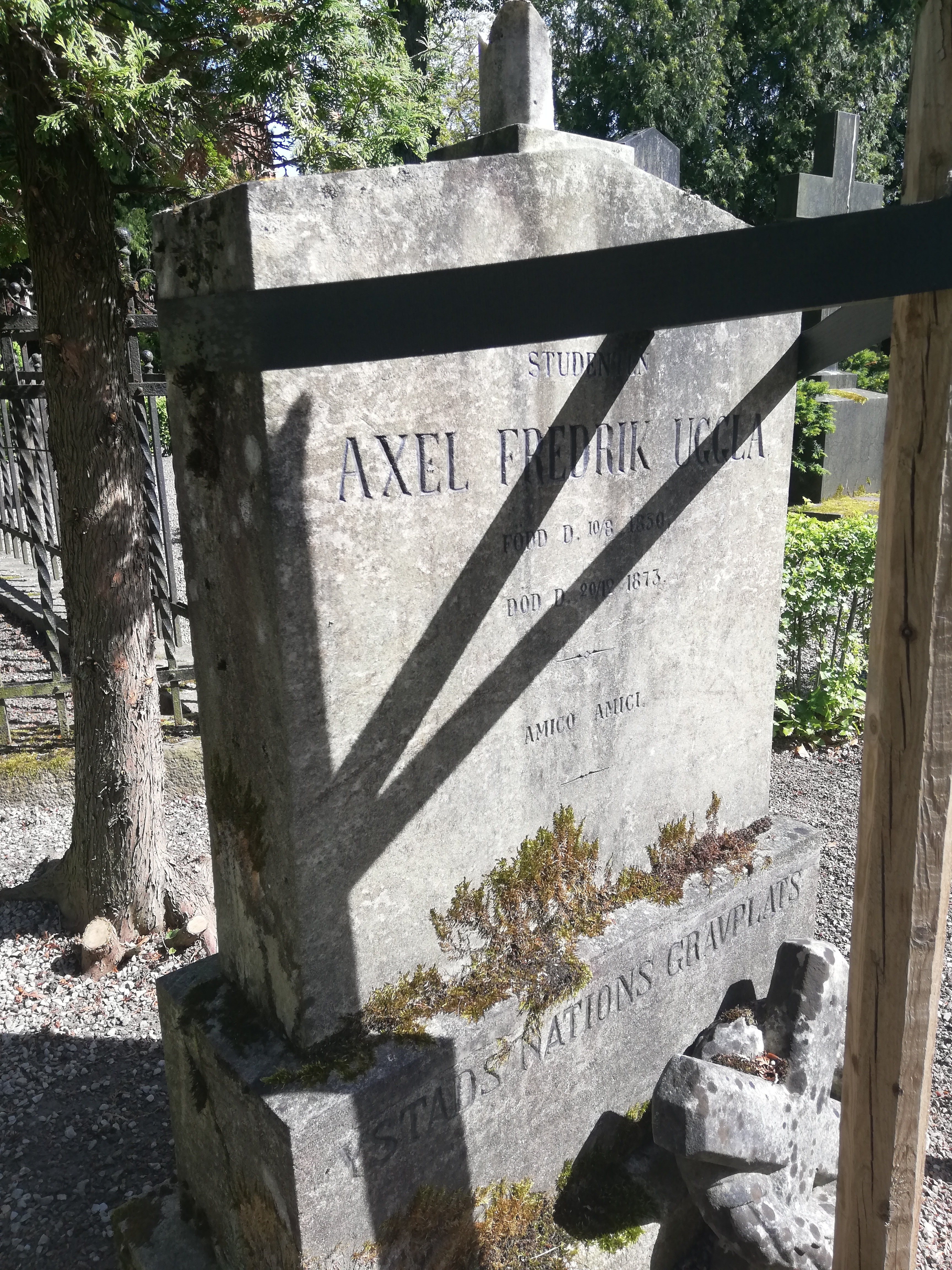 Sydskånska nationens grav på Östra kyrkogården i Lund.